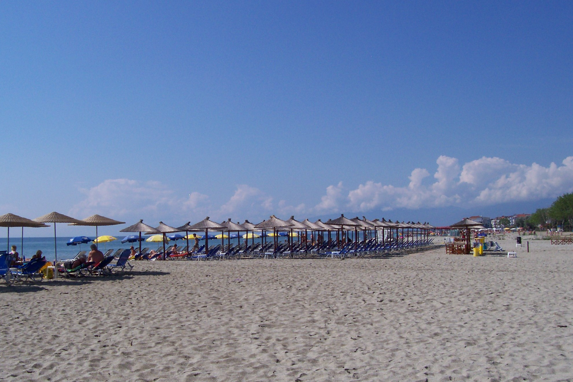 Beach Paralia Katerini